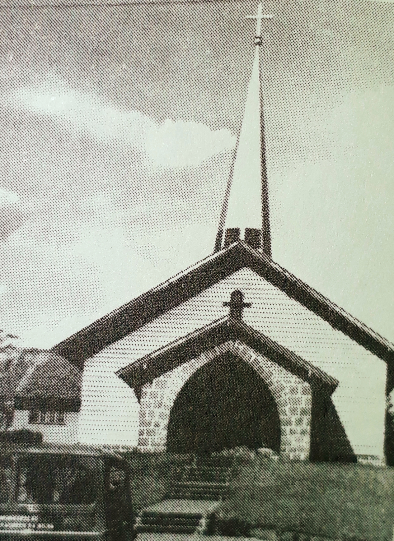 Vista da igreja católica de Harmonia, capela Nossa Senhora do Perpétuo Socorro, na década de 1960, em Telêmaco Borba, no Paraná.